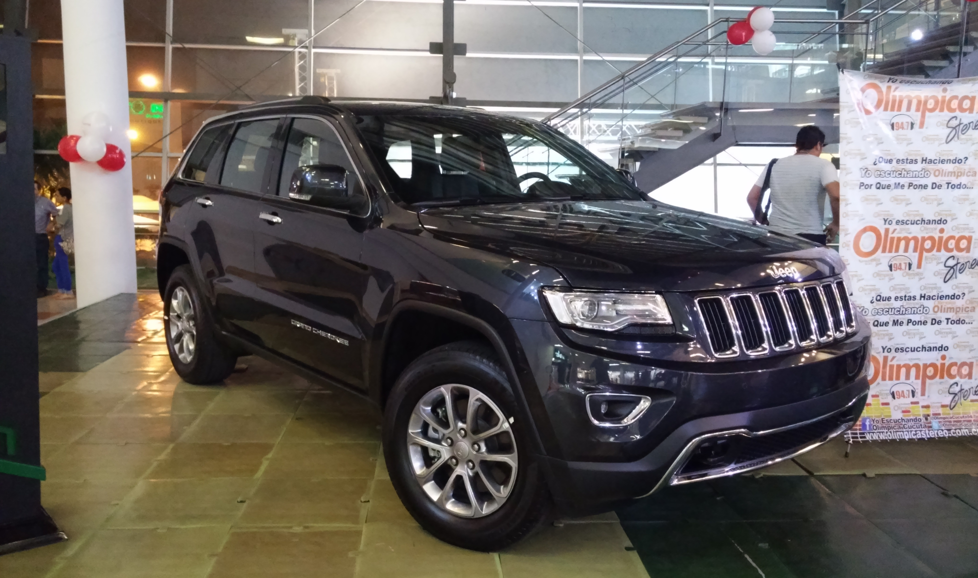 Jeep grand cherokee modelo 2015